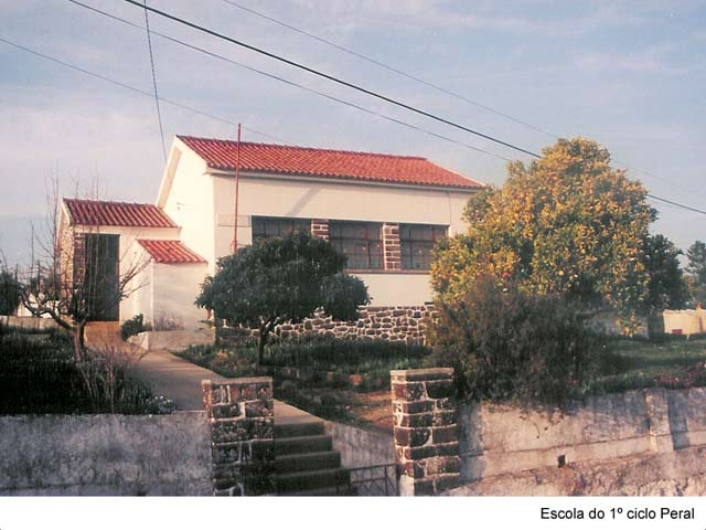 Escola do 1º ciclo de Peral